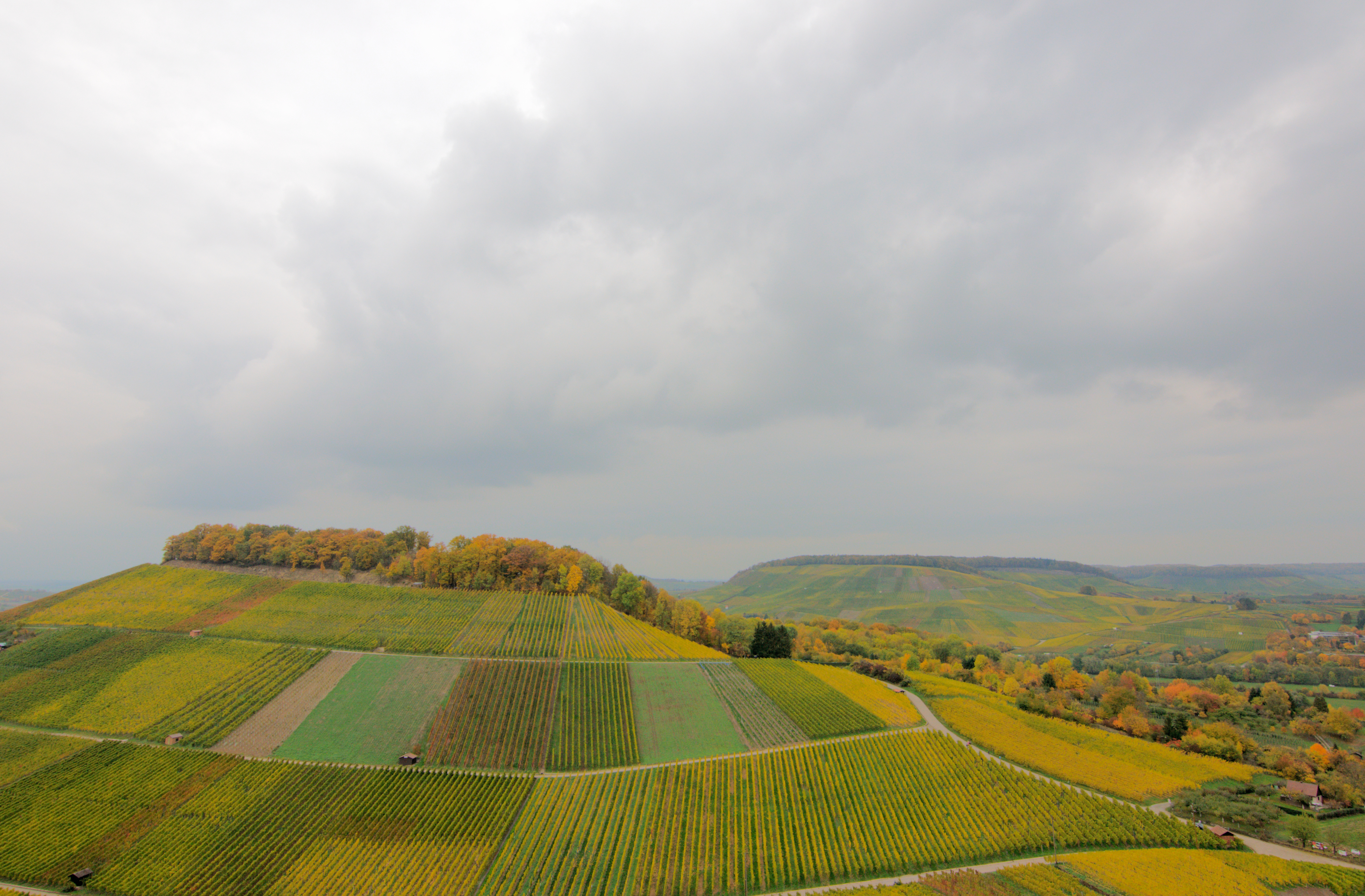 Heilbronner Land im Herbst; Blick von der Burgruine Weibertreu. Im Vordergrund der Weinsberger Schemelsberg, im Hintergrund der Erlenbacher Kayberg.